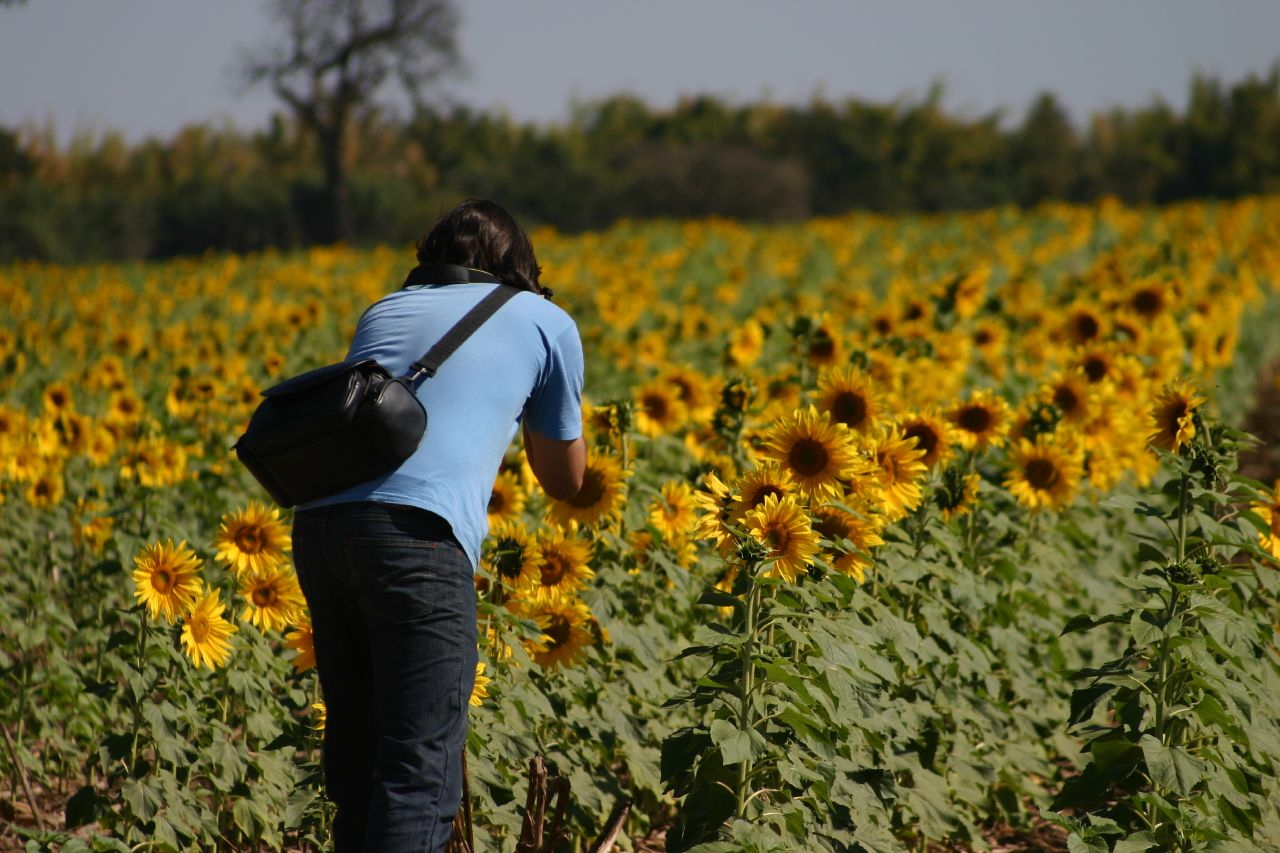 Plantação de girassol em Holambra